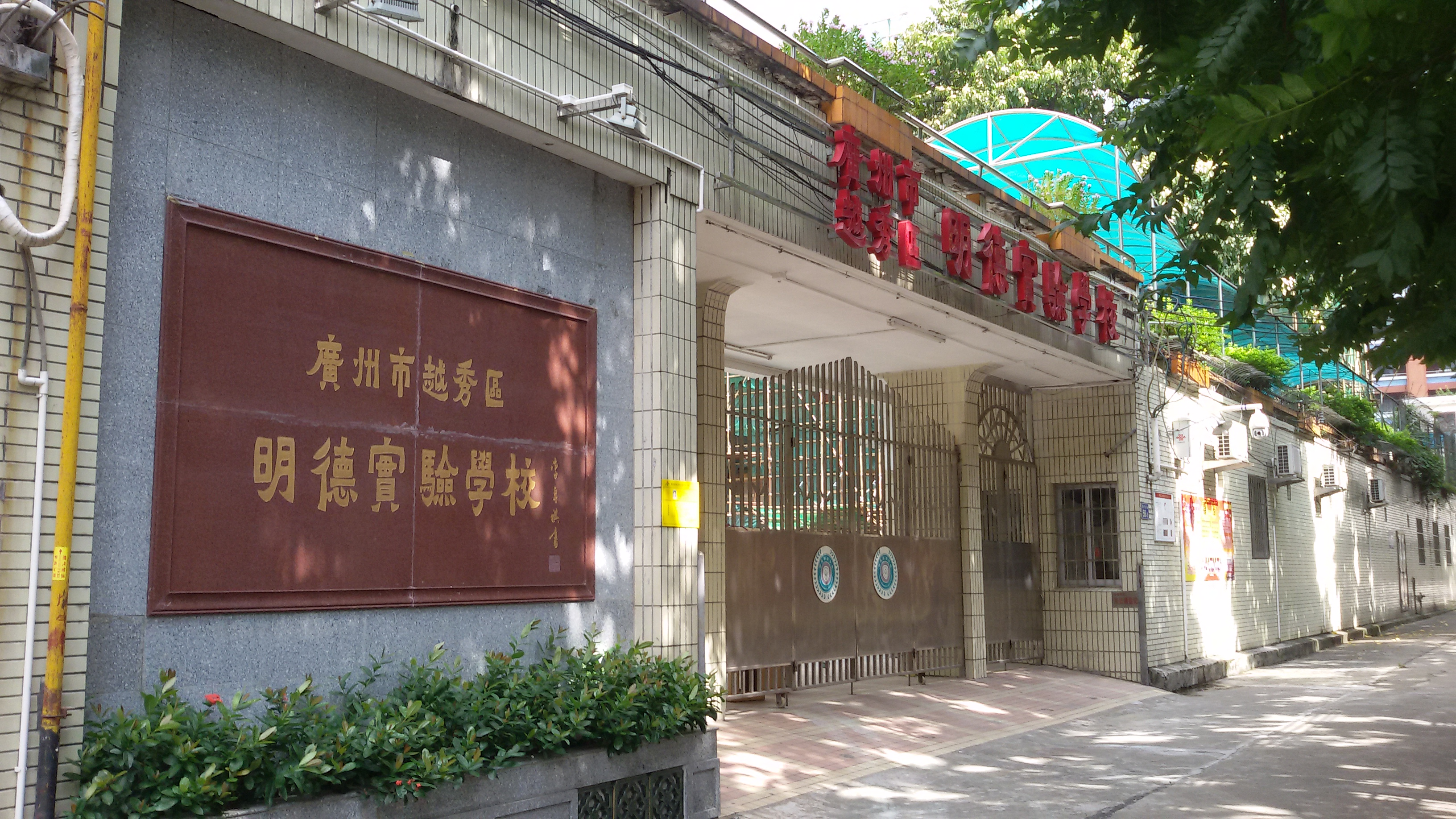 粵語: 越秀區明德實驗學校嘅門口